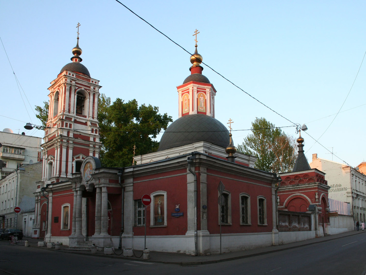 Церковь Николая Чудотворца в Подкопаях. 16-17 вв., 19 век.